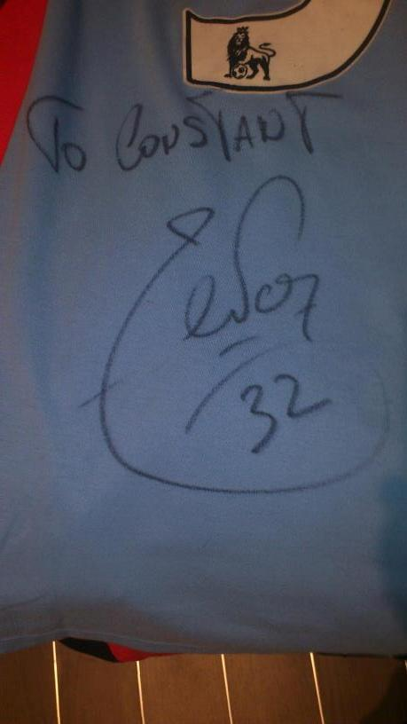 La signature de Carlos Tévez sur le maillot dédicacé et donné à son jeune fan français, Constant Pâris.